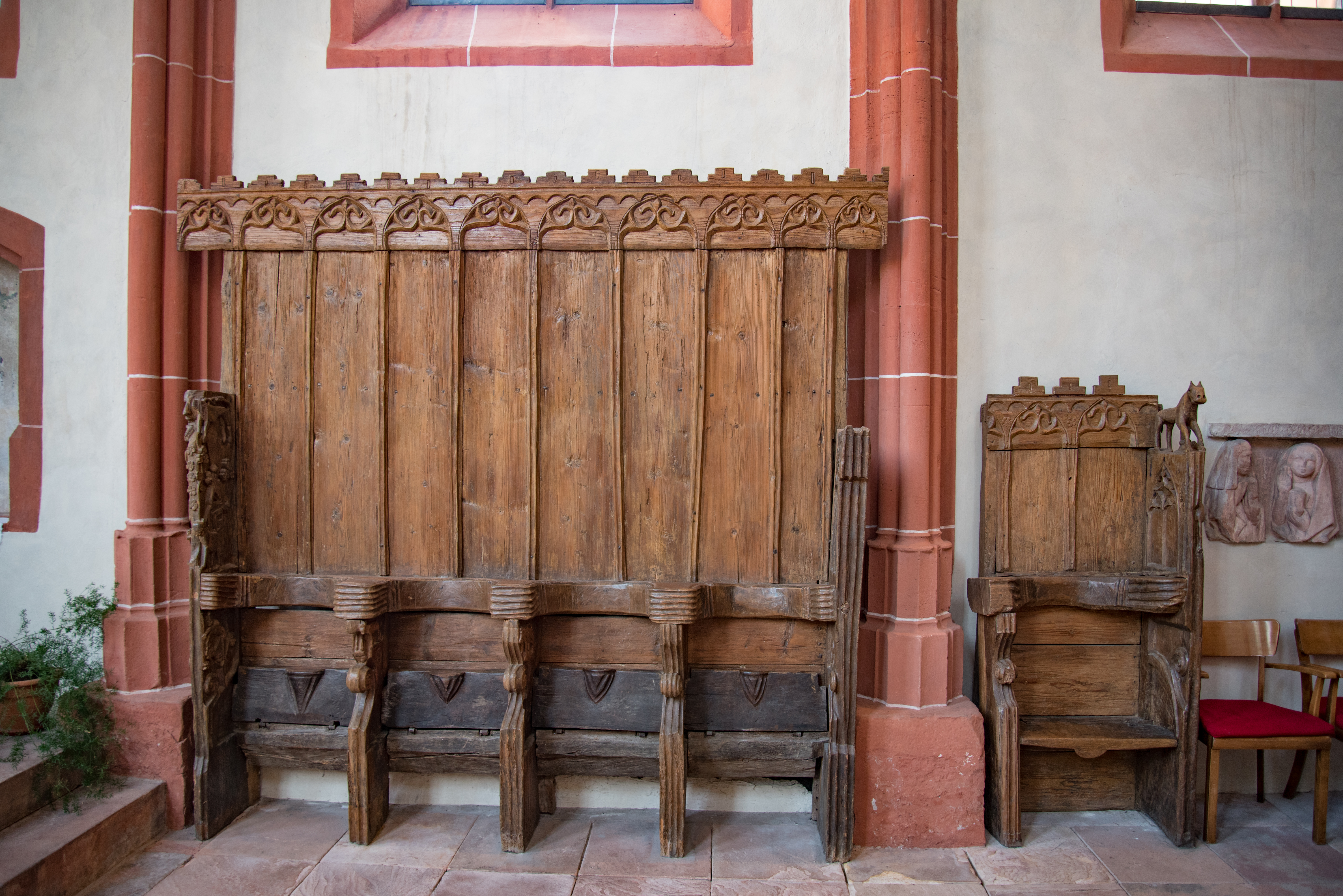 Ortenberg, Schloßplatz 4, Marienkirche, Chorgestühl